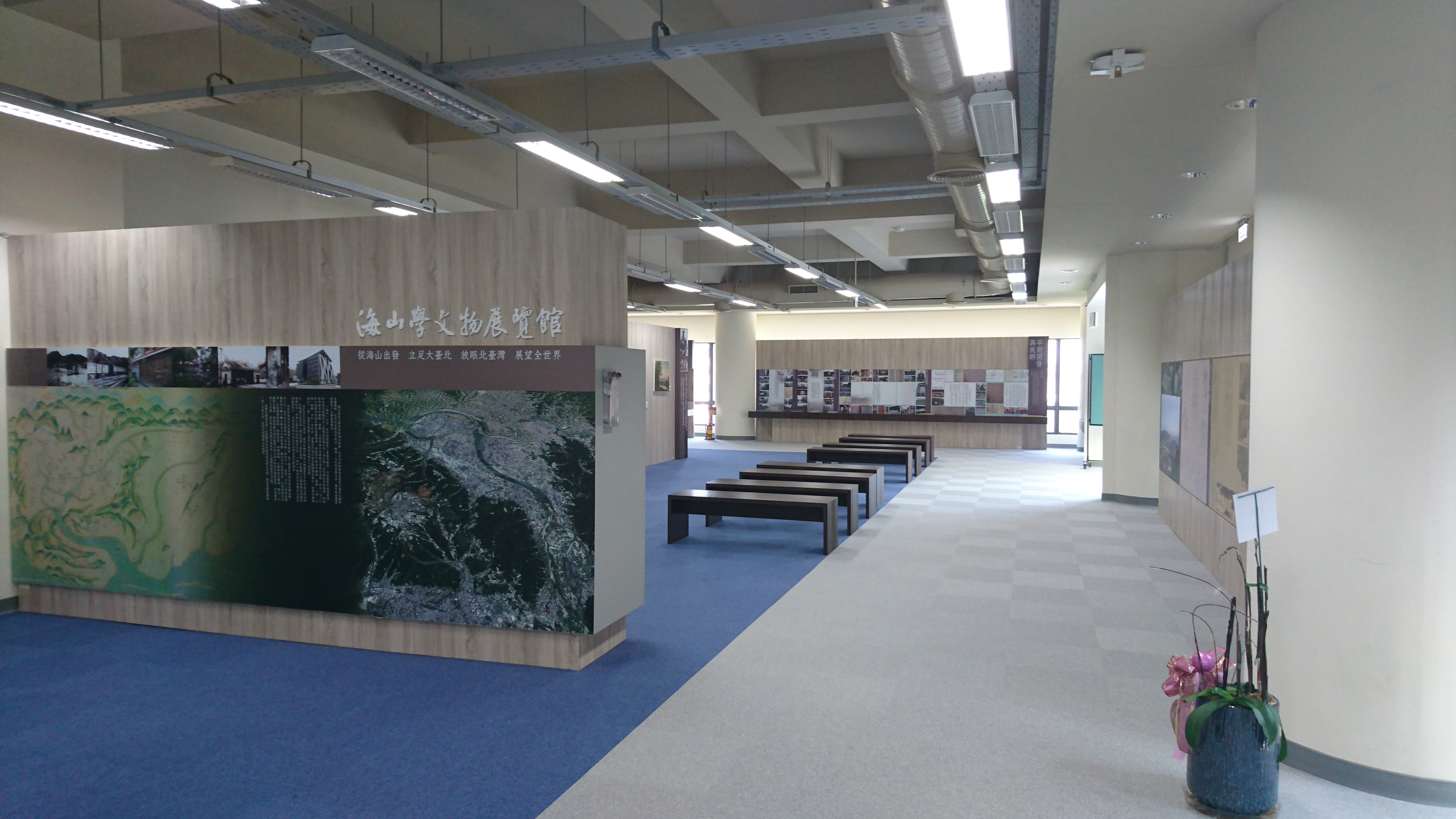 中文（台灣）: 國立臺北大學海山學文物展覽館。